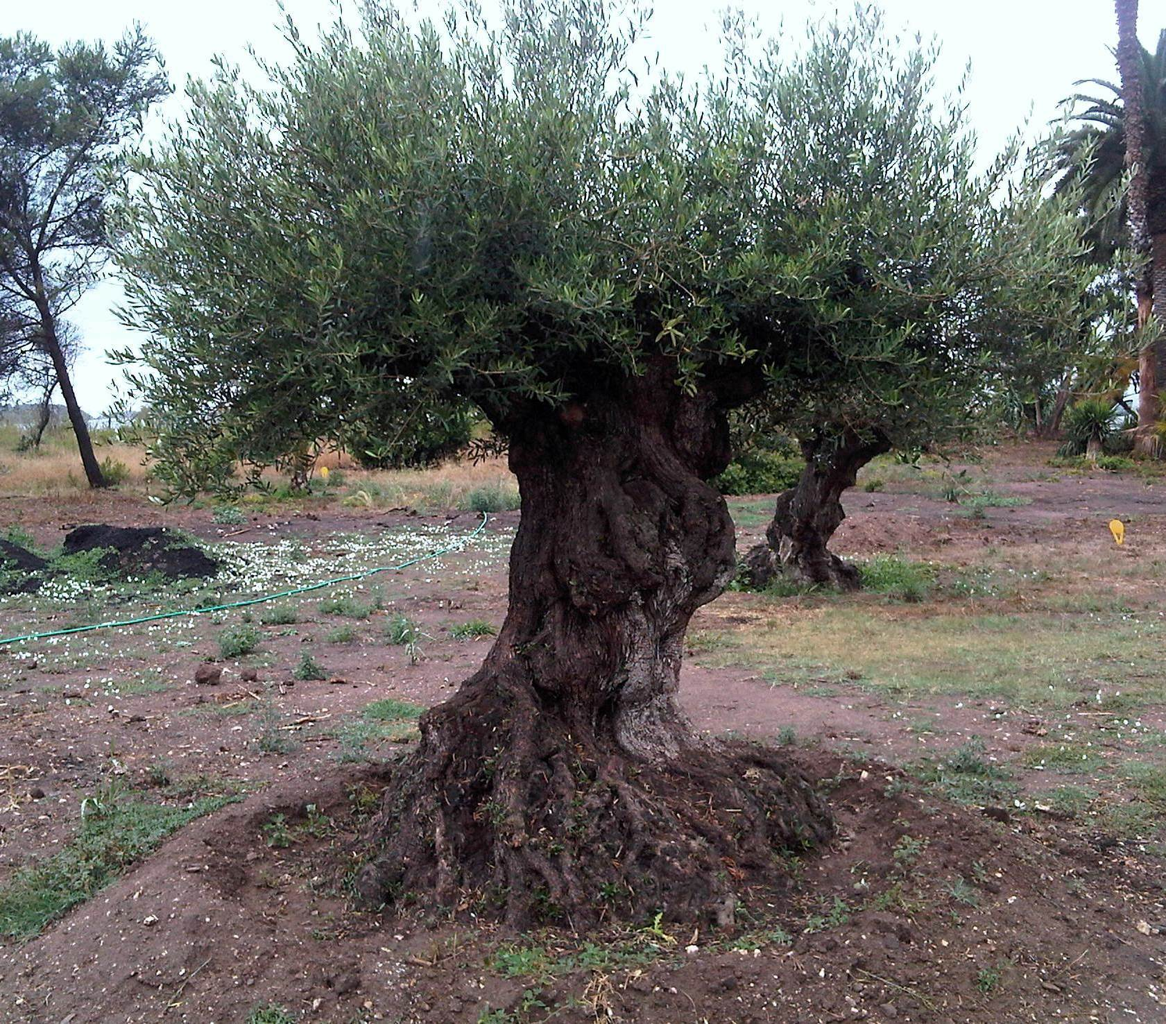 olijfboom